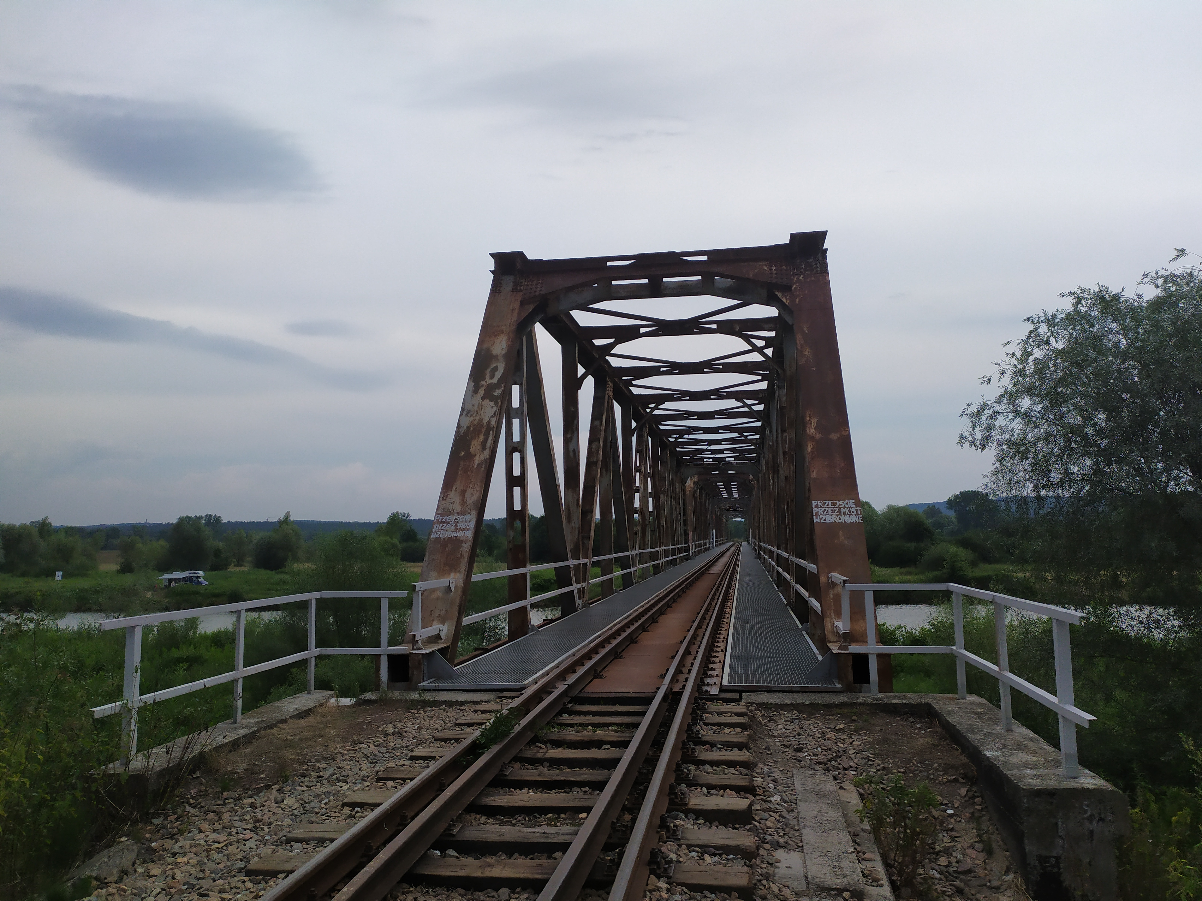 Most kolejowy nad Wisłą w Okleśnej (2019)